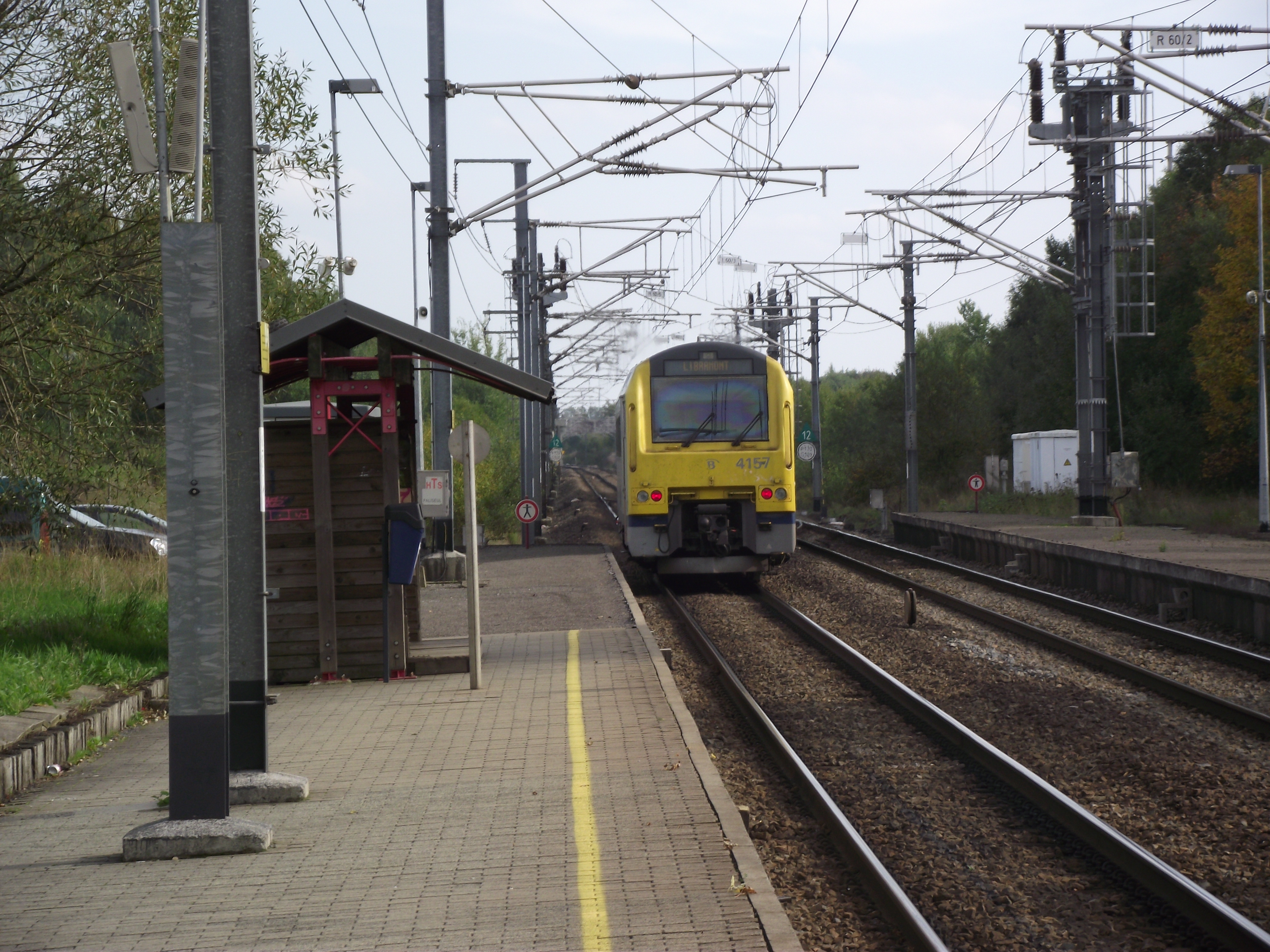 Paliseul station met dieseltreinstel 41